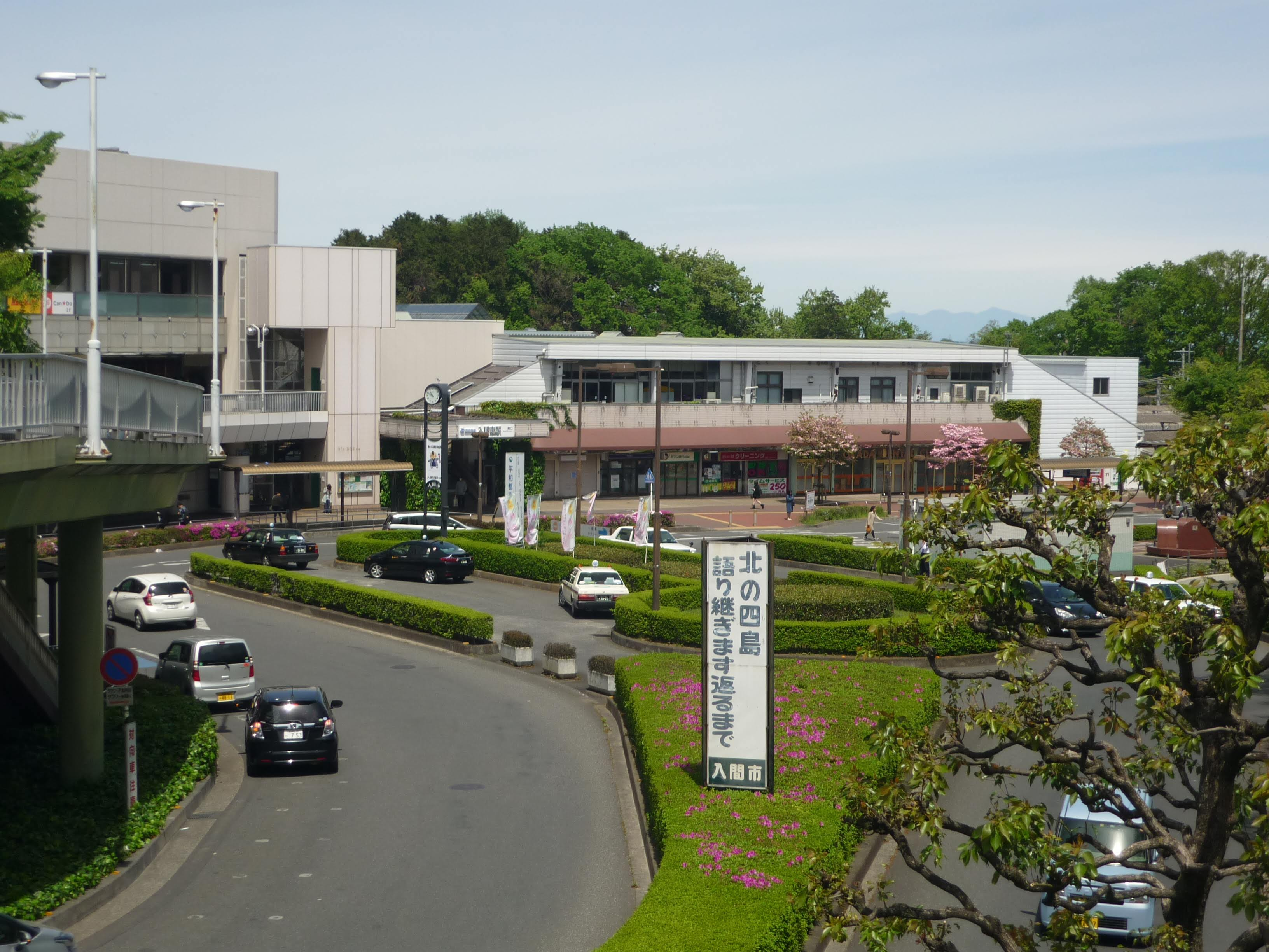 入間市駅南口